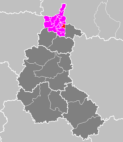 Maps of arrondissements and cantons of France: Arrondissement de Charleville-Mézières - Canton de Villers-Semeuse.PNG